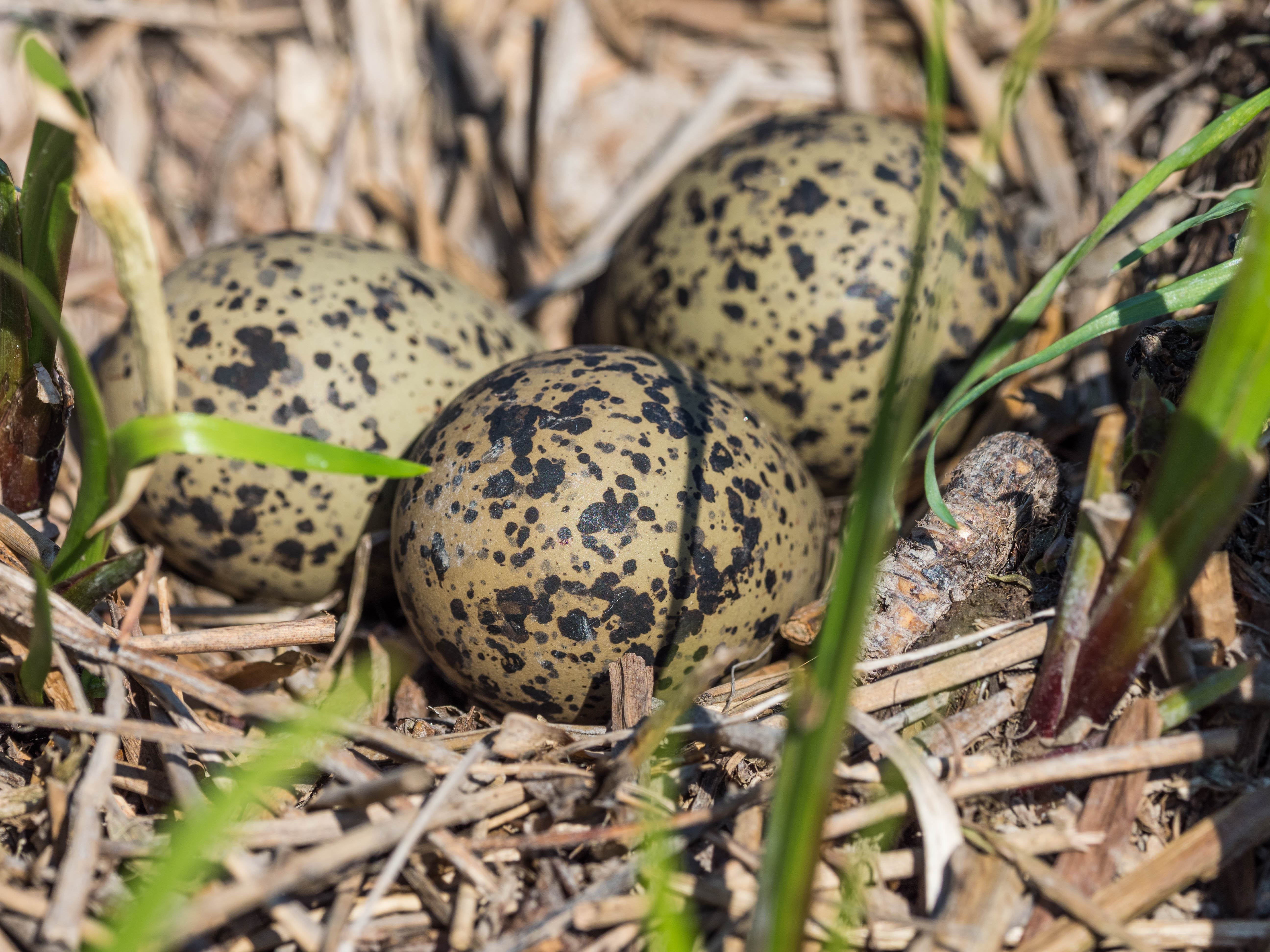 Larus canus